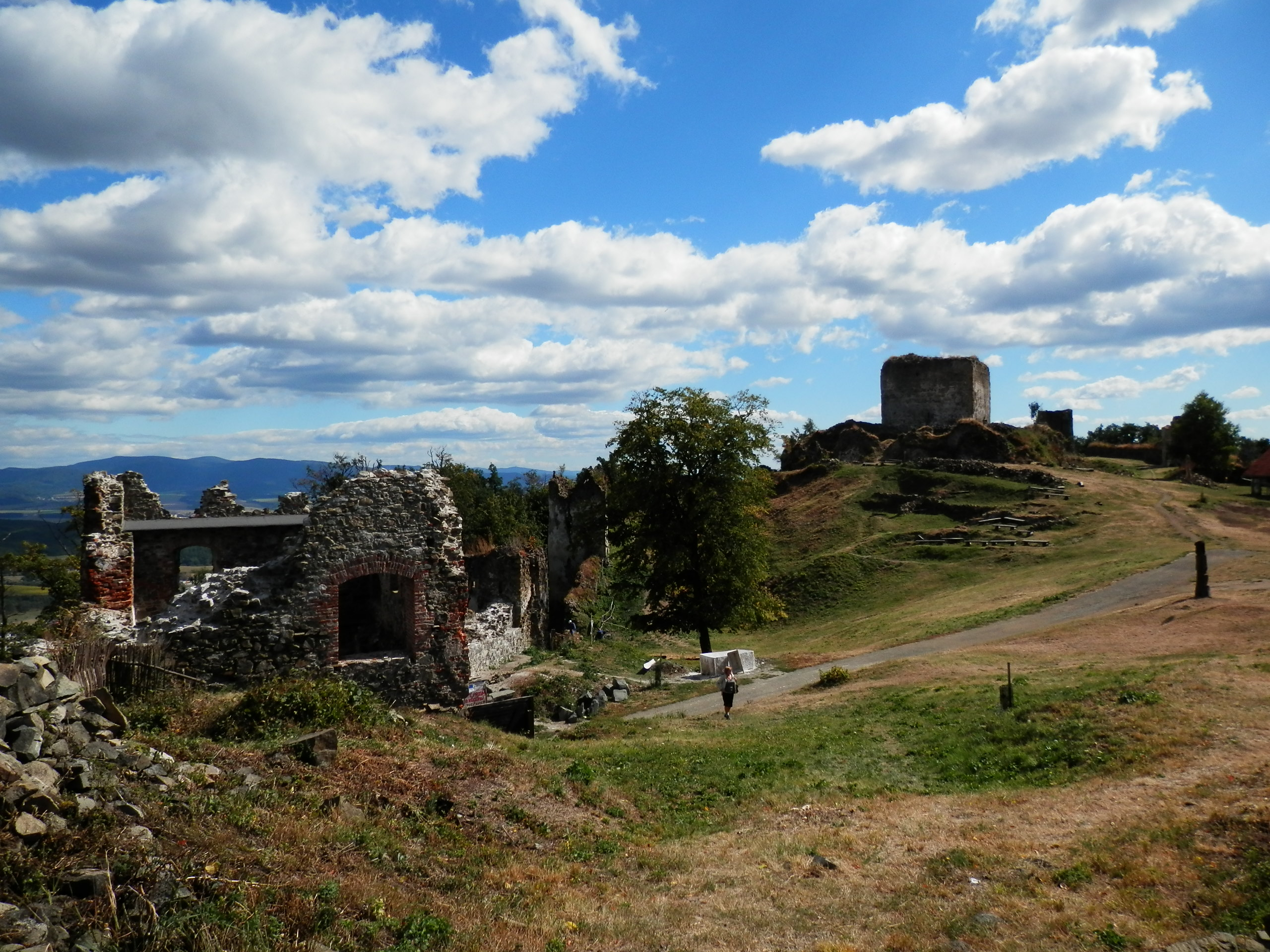 Rekonštruované stavby Šarišského hradu. Mesto Veľký Šariš okres Prešov. Object location49° 03′ 09.62″ N, 21° 10′ 32.61″ E